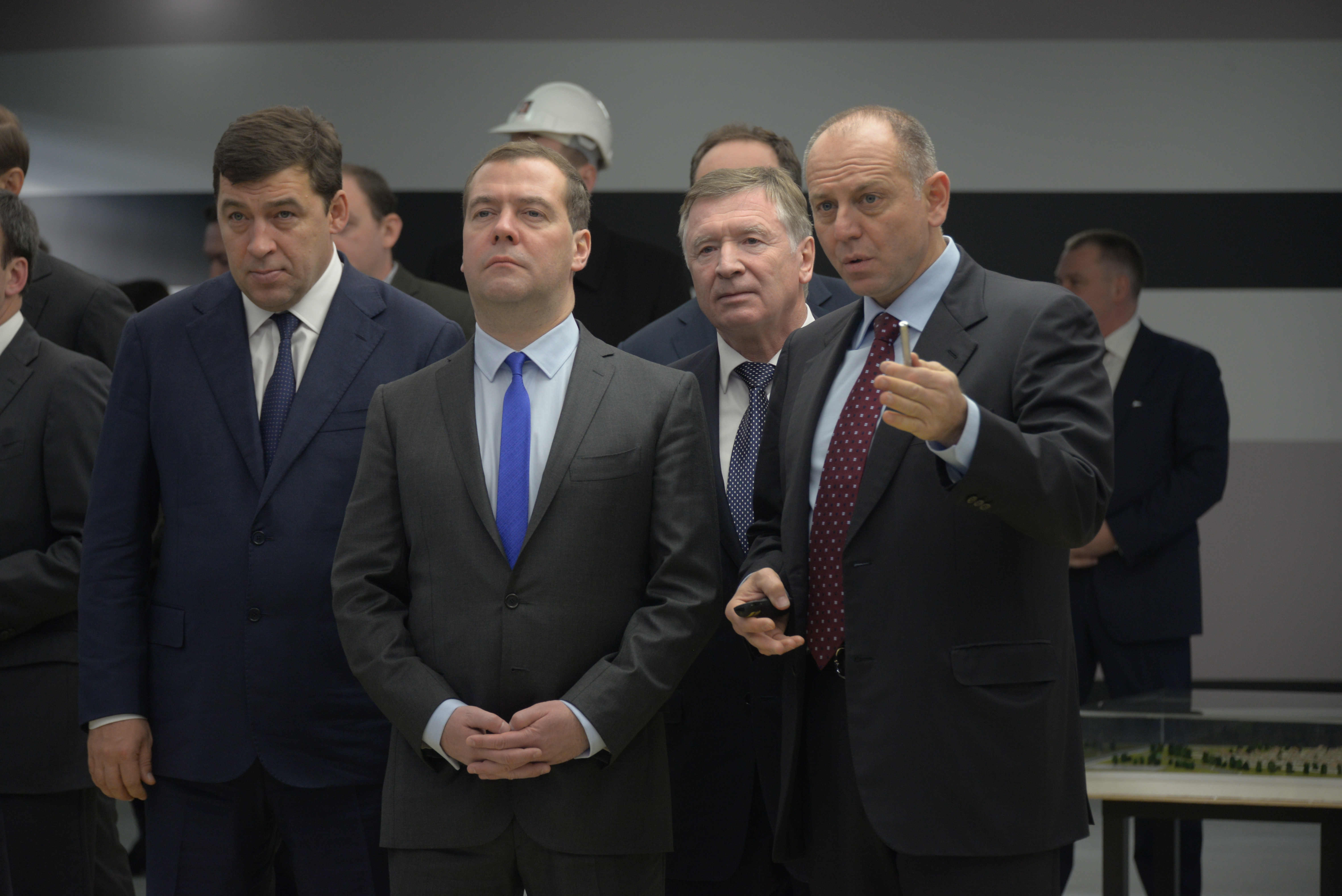 На новом стане.